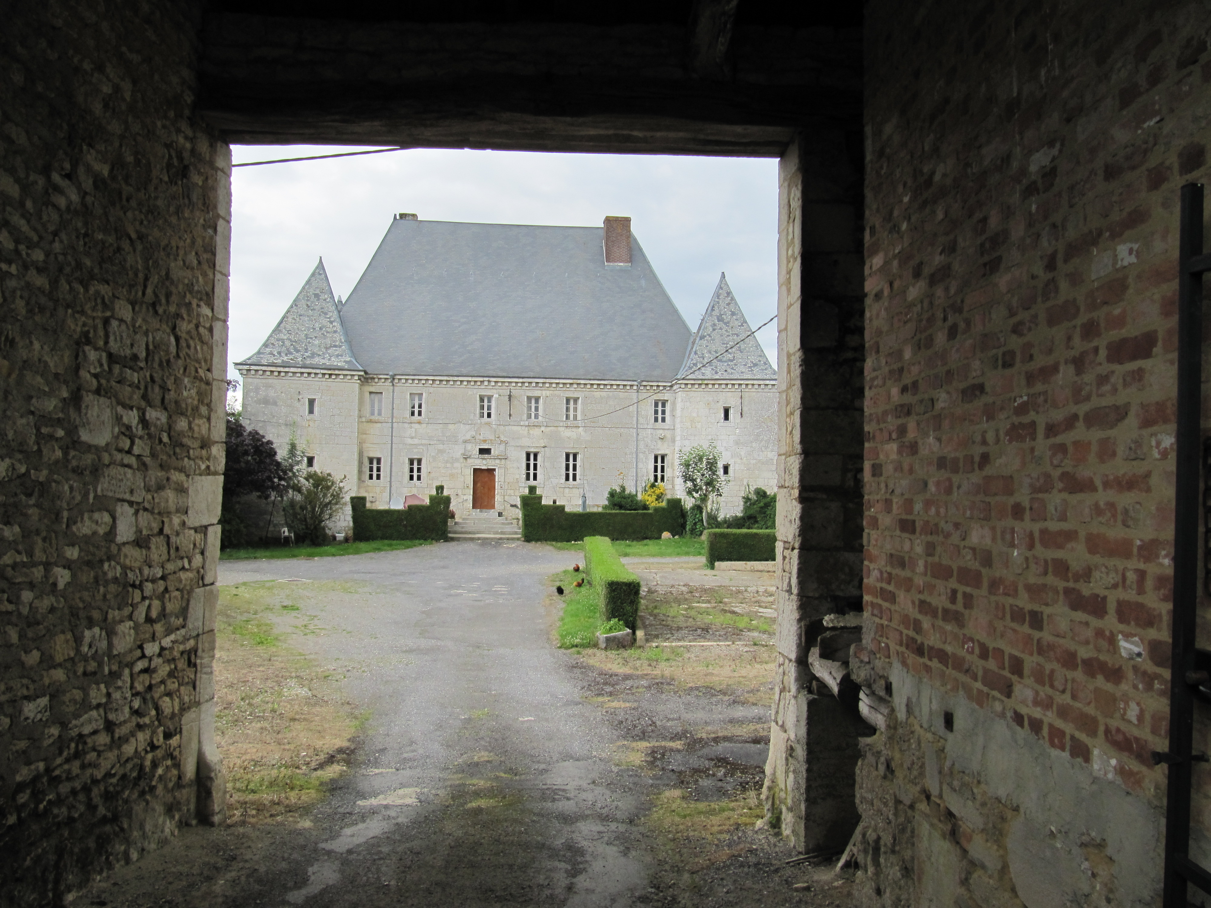 Ferme du Maipas - commune de Prez - Ardennes - France